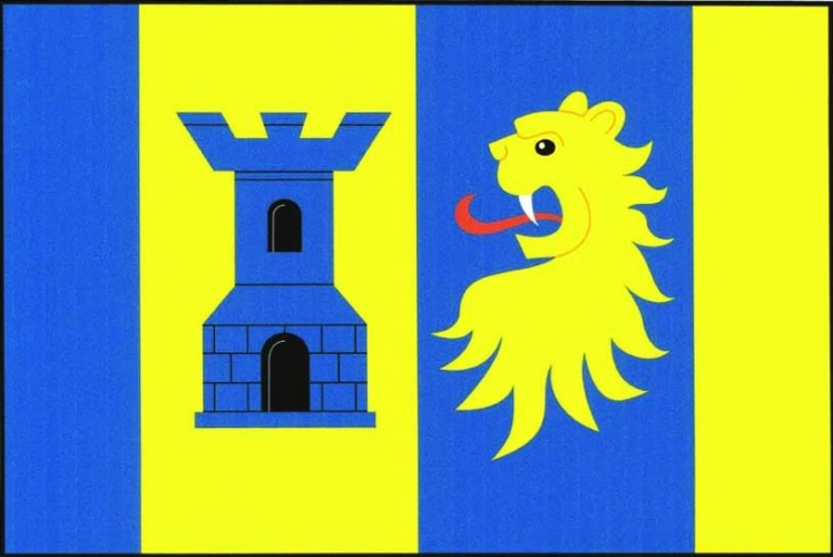 vlajka, Lovčovice, okres Třebíč